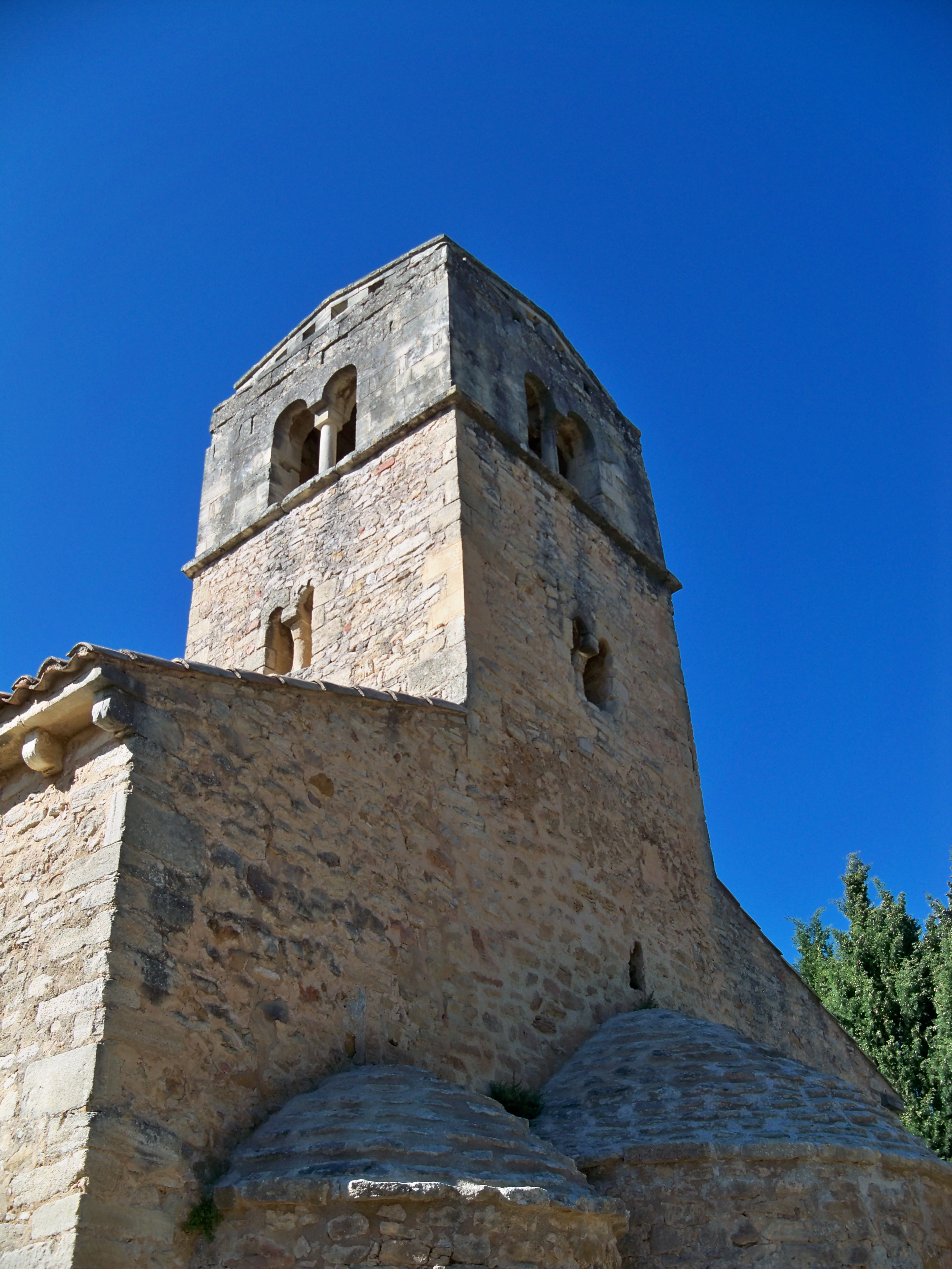 Chapelle de la Madeleine à Bédoin (84)